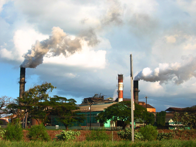 Hawaiian Commercial & Sugar Company (HC&S) Puunene sugar mill, Puʻunene, Maui — Hawaii.